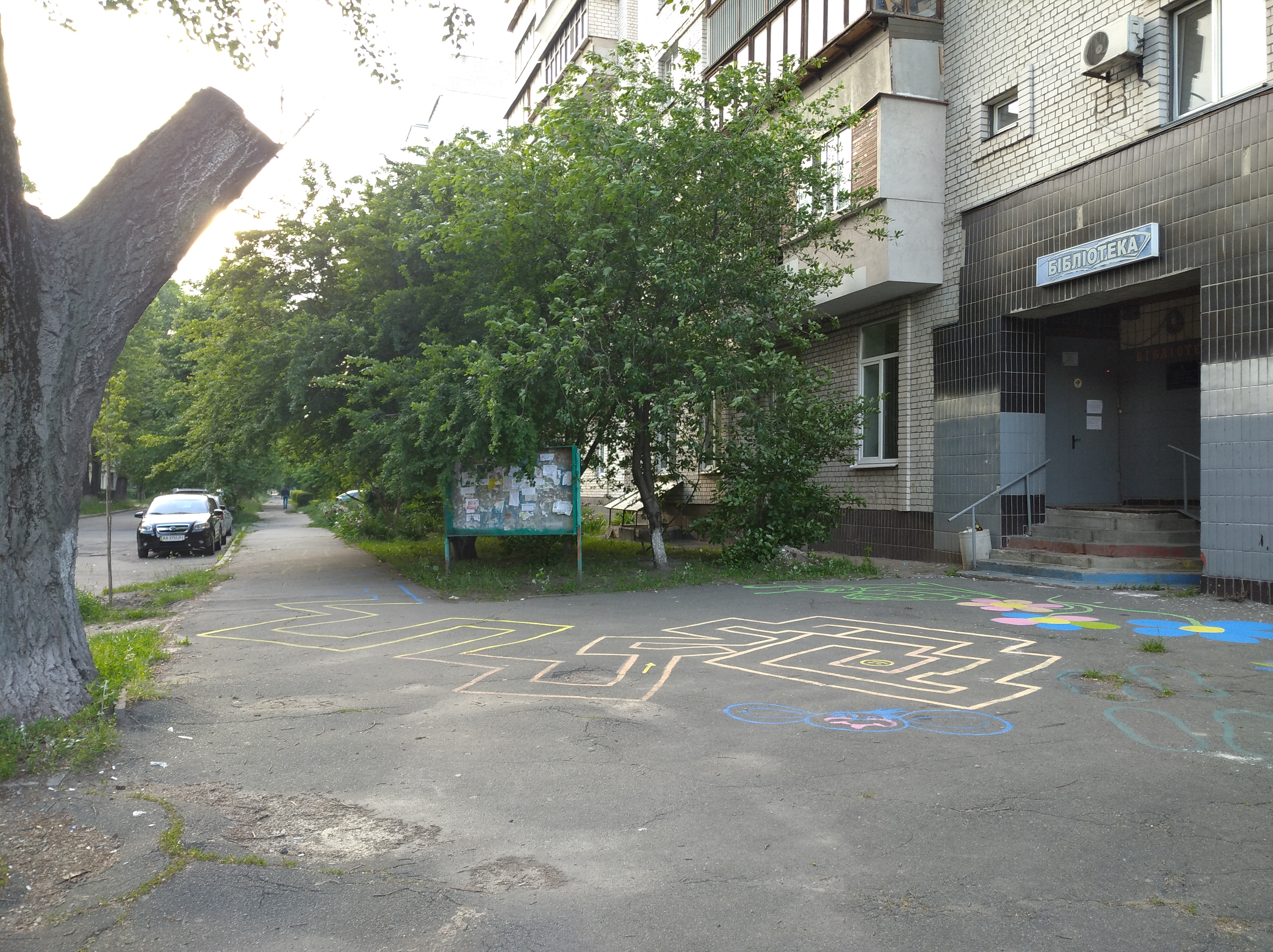 Вулиця Шепелева